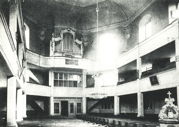 Die Orgel und die Emporen der Loschwitzer Kirche vor der großen Renovierung.